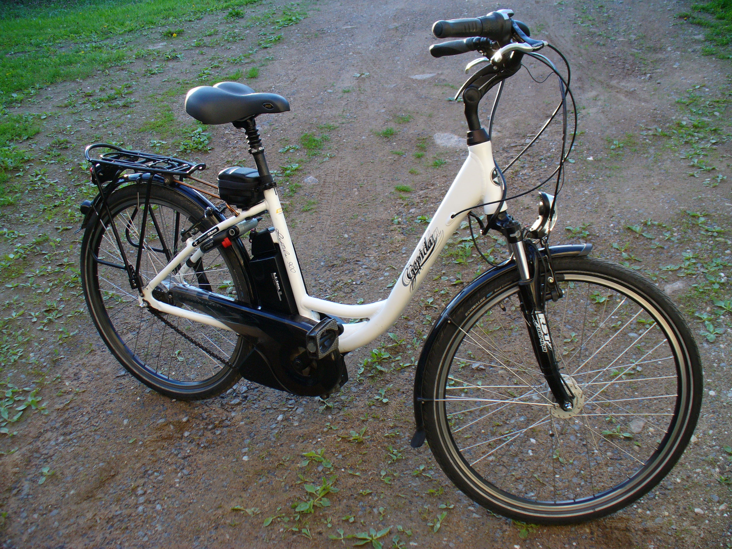 Gepida (Ungarn)Pedelec, Damenversion, Modell Reptila mit Yamaha Mittelmotor und Lion-Akku, 8-Gang-Shimano-Nabenschaltung, Shimano Nabendynamo im Vorderrad, Axa-Defender Rahmenschloss mit zusätzlicher Einsteckkette (in Satteltasche), Bj. etwa 2010